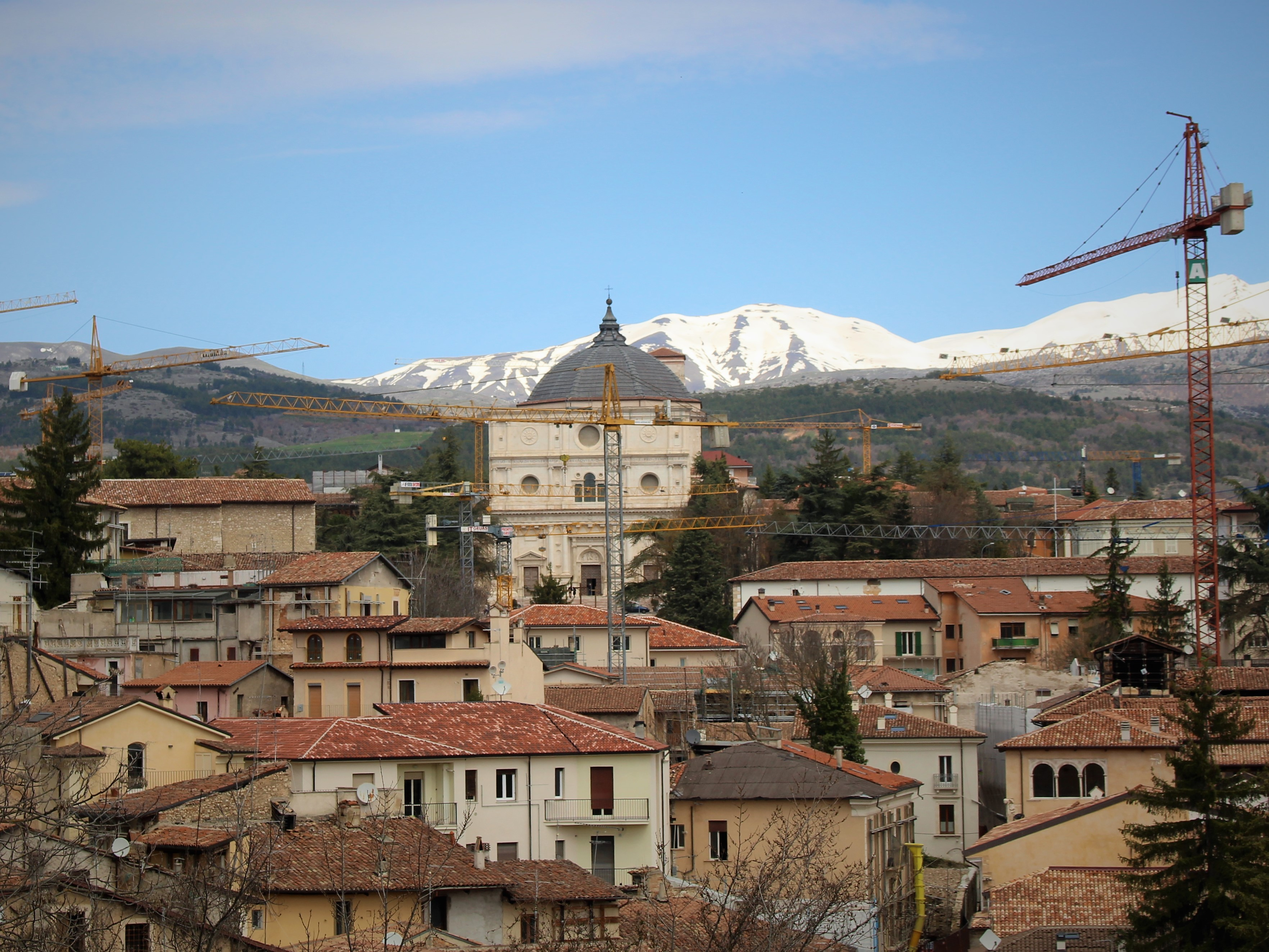 Vista della basilica di San Bernardino in L'Aquila dalla cinta muraria.